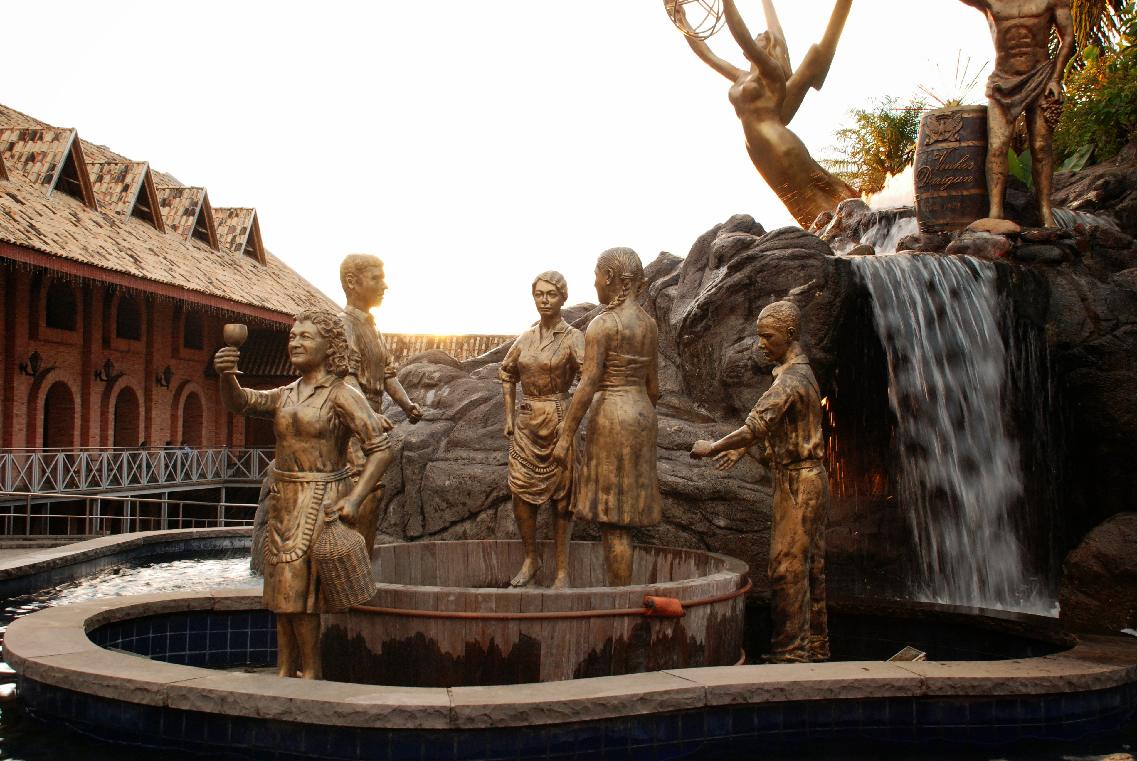 Vinhos Durigan - Estátua em Curitiba